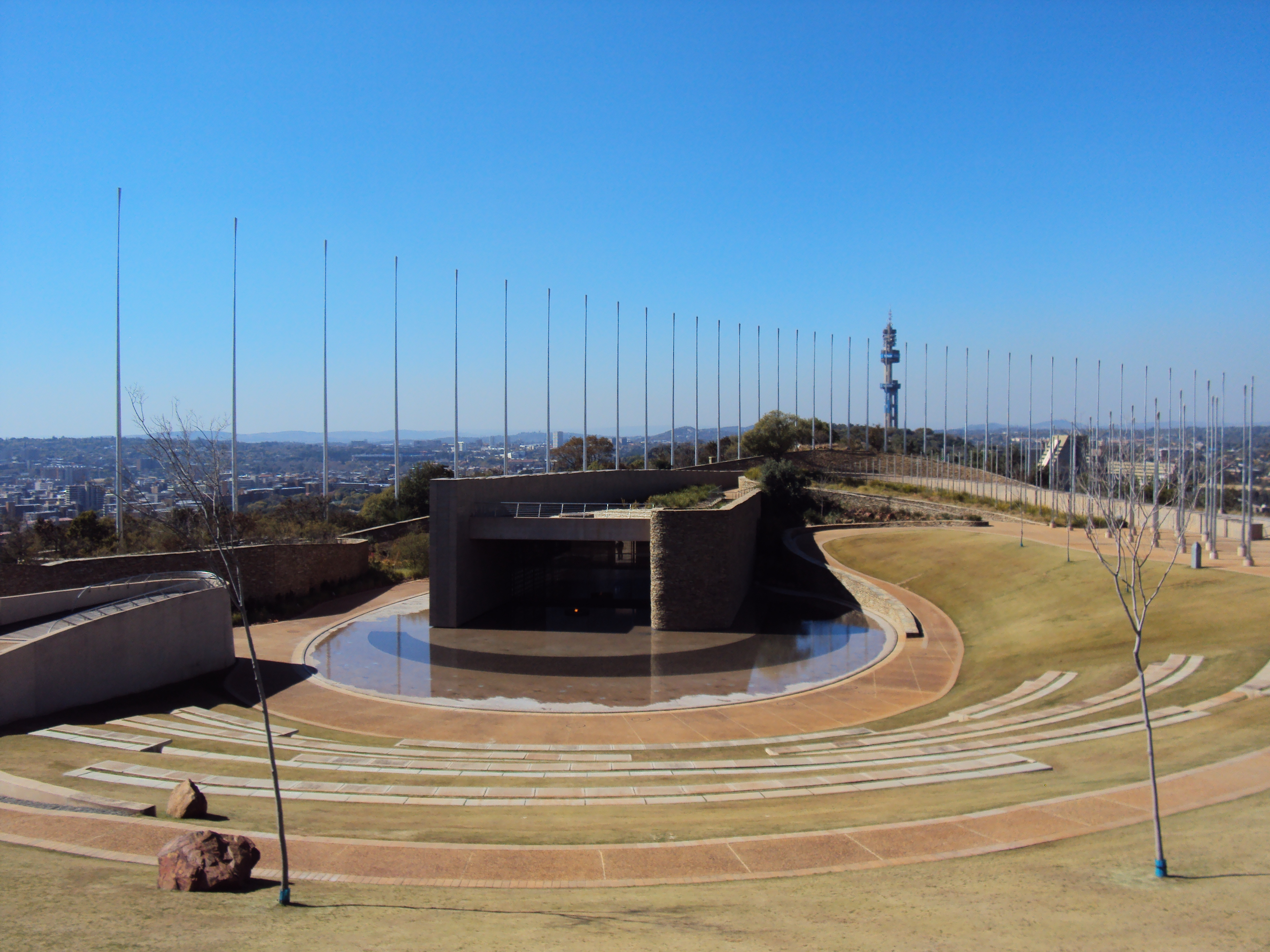 Anfiteatro en Freedom Park Unknown